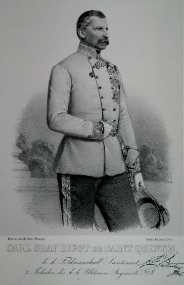 Karl August Graf Bigot de Saint-Quentin 1863